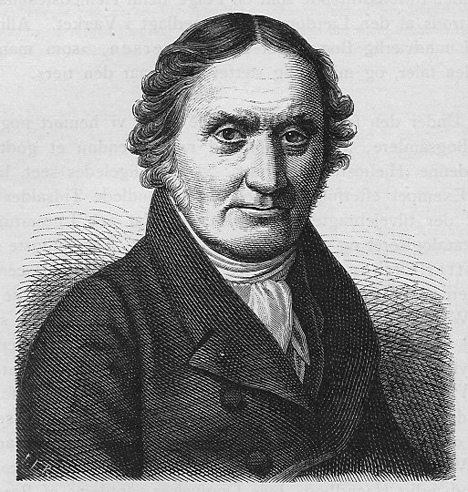 Rasmus Nyerup